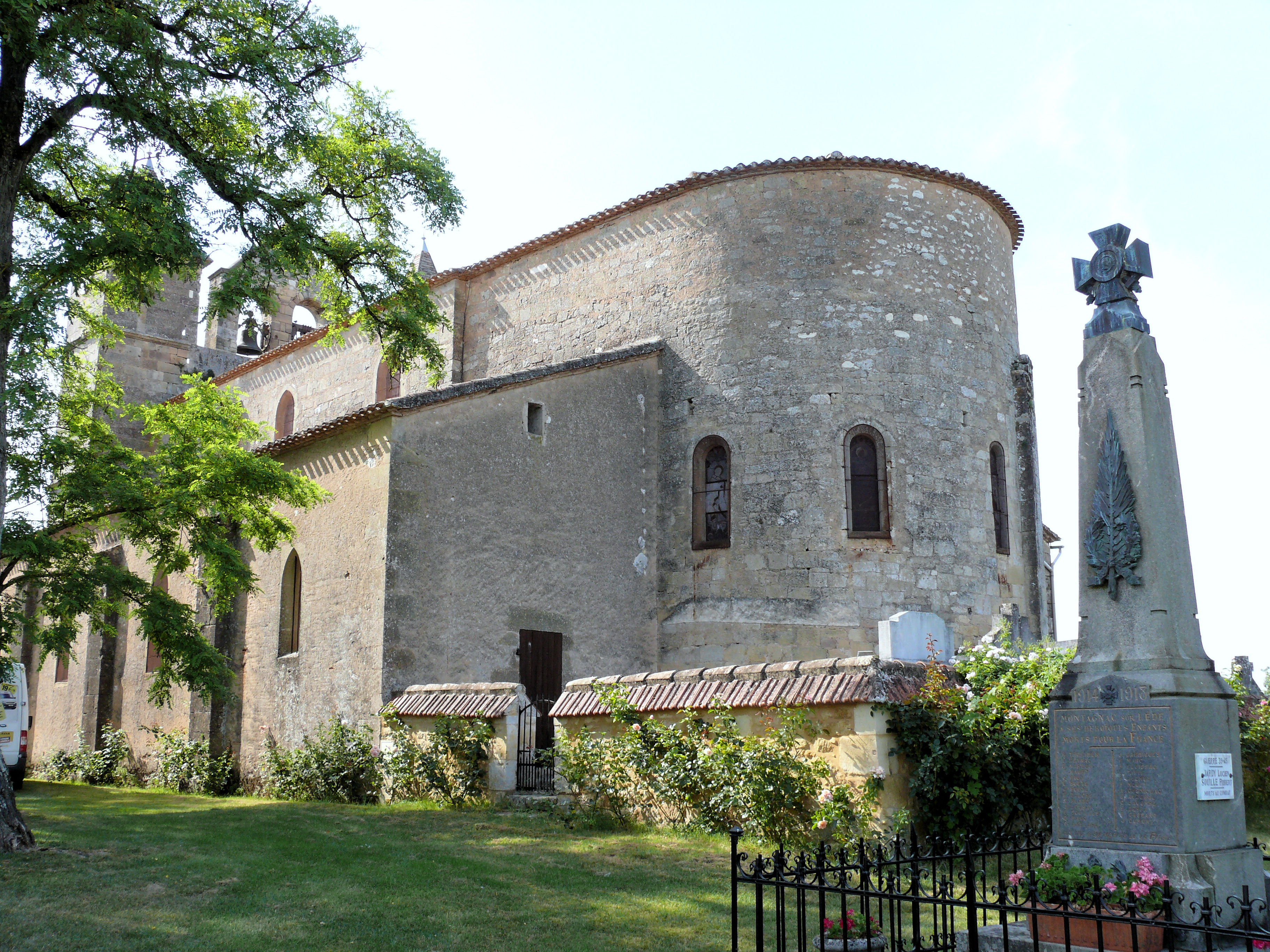 Montagnac-sur-Lède - Eglise Saint-Martin